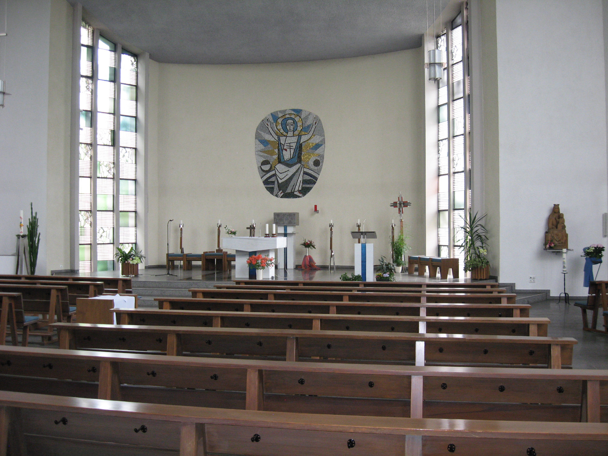 Innenraum Sankt Maria Immaculata mit Mosaik